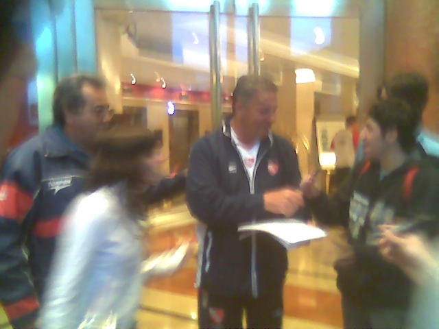 Pepe Santoro firmando autografos de los fanaticos de Independiente